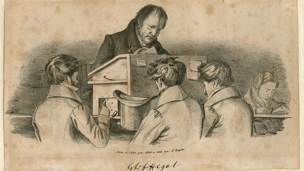 Friedrich Hegel (1770-1831) mit Studenten. Lithographie.